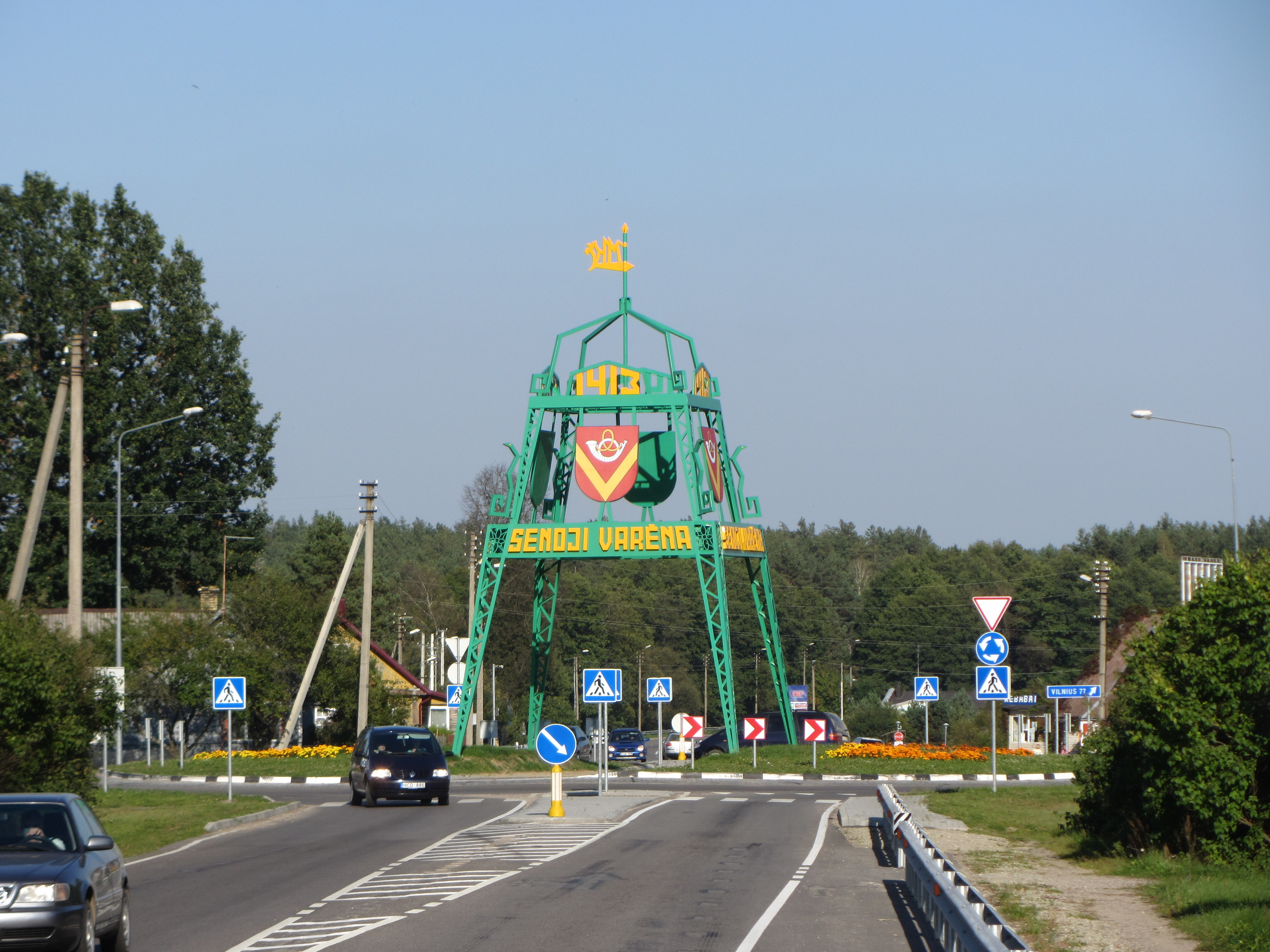 Senoji Varėna, Lithuania